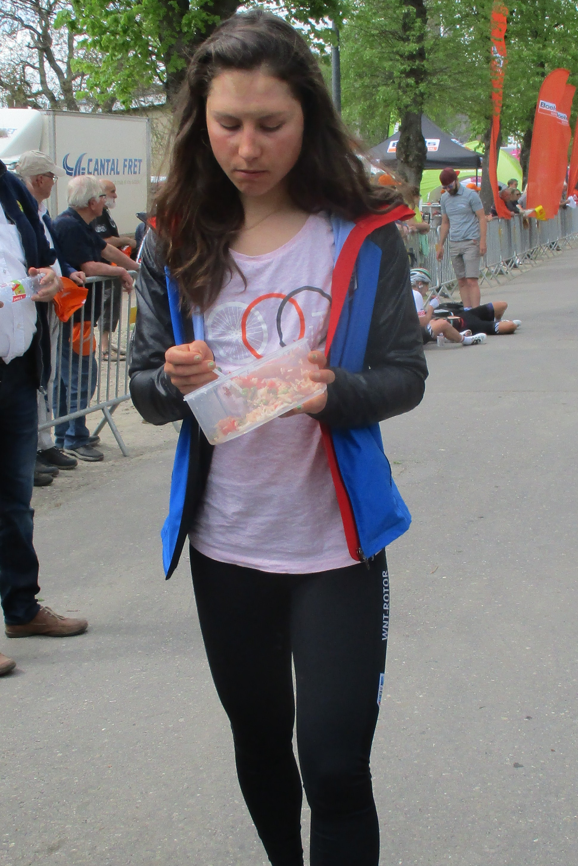 Finish van de Waalse Pijl 2019 voor vrouwen op de Mur de Huy